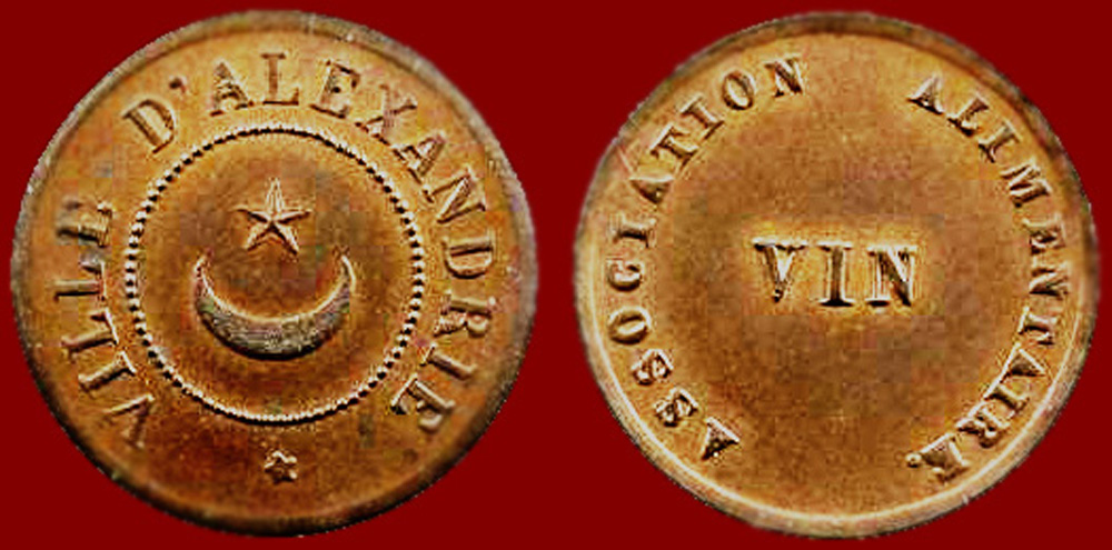 Jeton de vin de l'association alimentaire d'Alexandrie, 1868